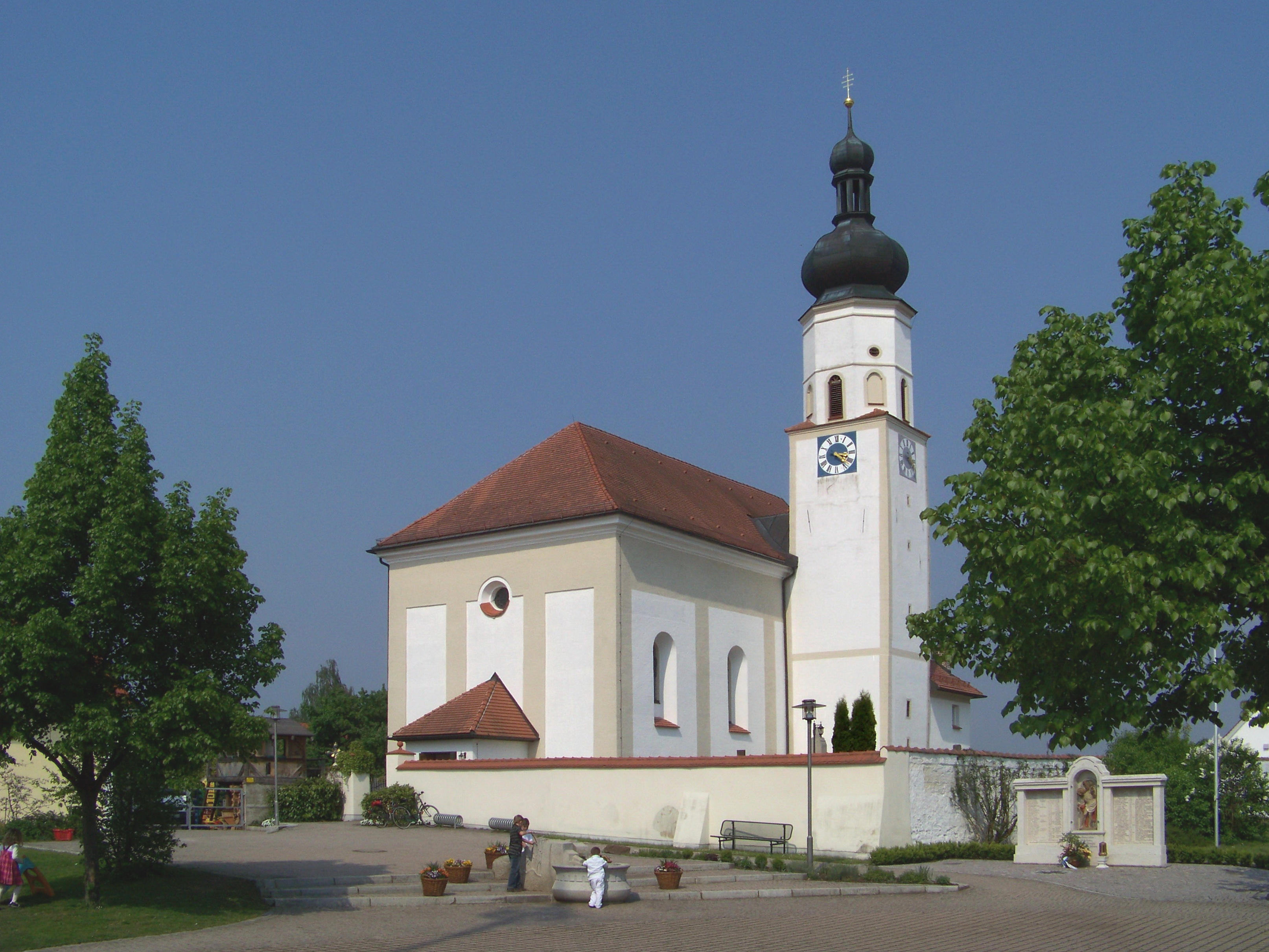 Feldkirchen, kath. Pfarrkirche St. Laurentius, 1752-57; mit Ausstattung